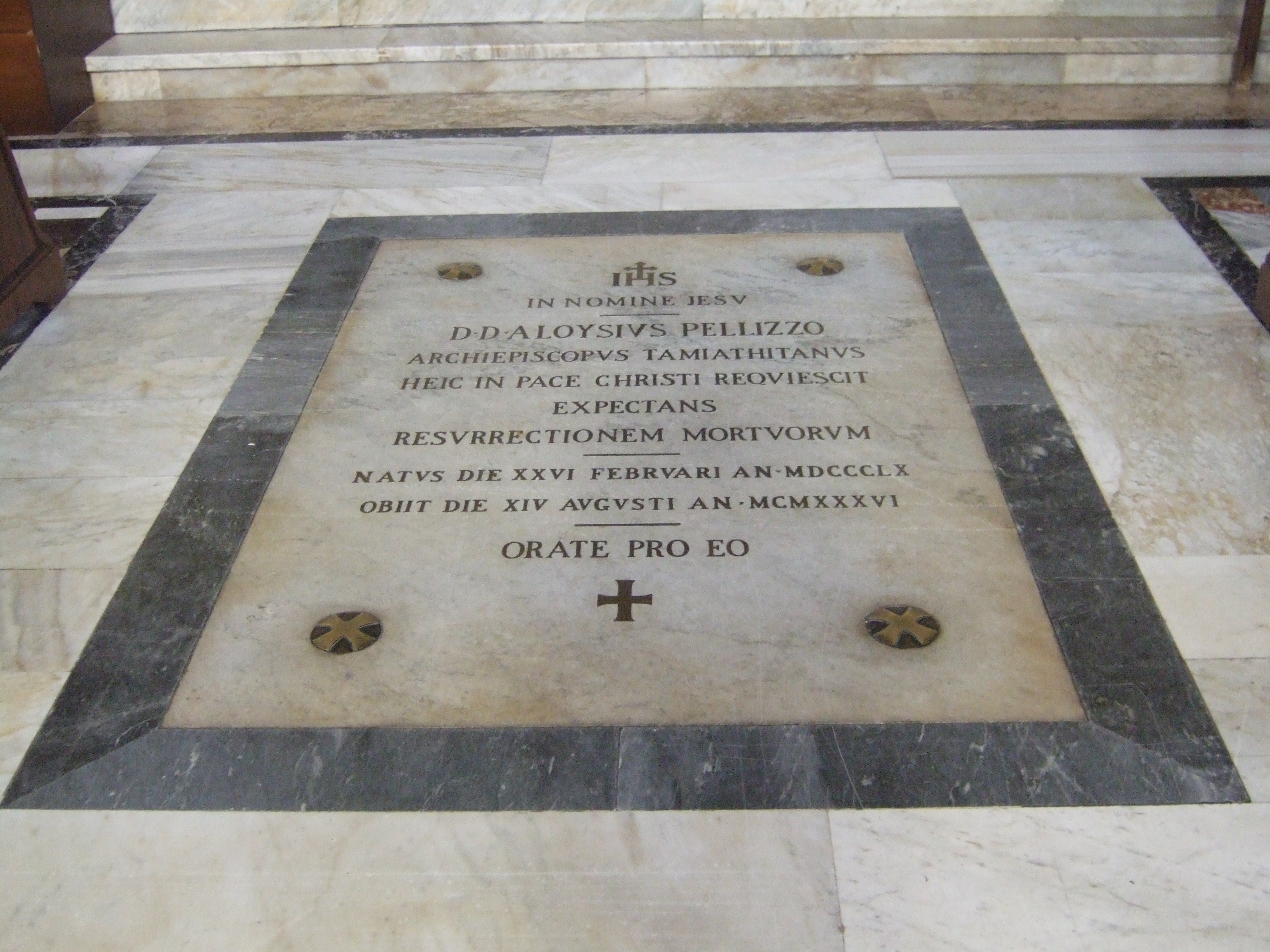 Chiesa parrochhiale di Faedis - Tomba mons. Pelizzo